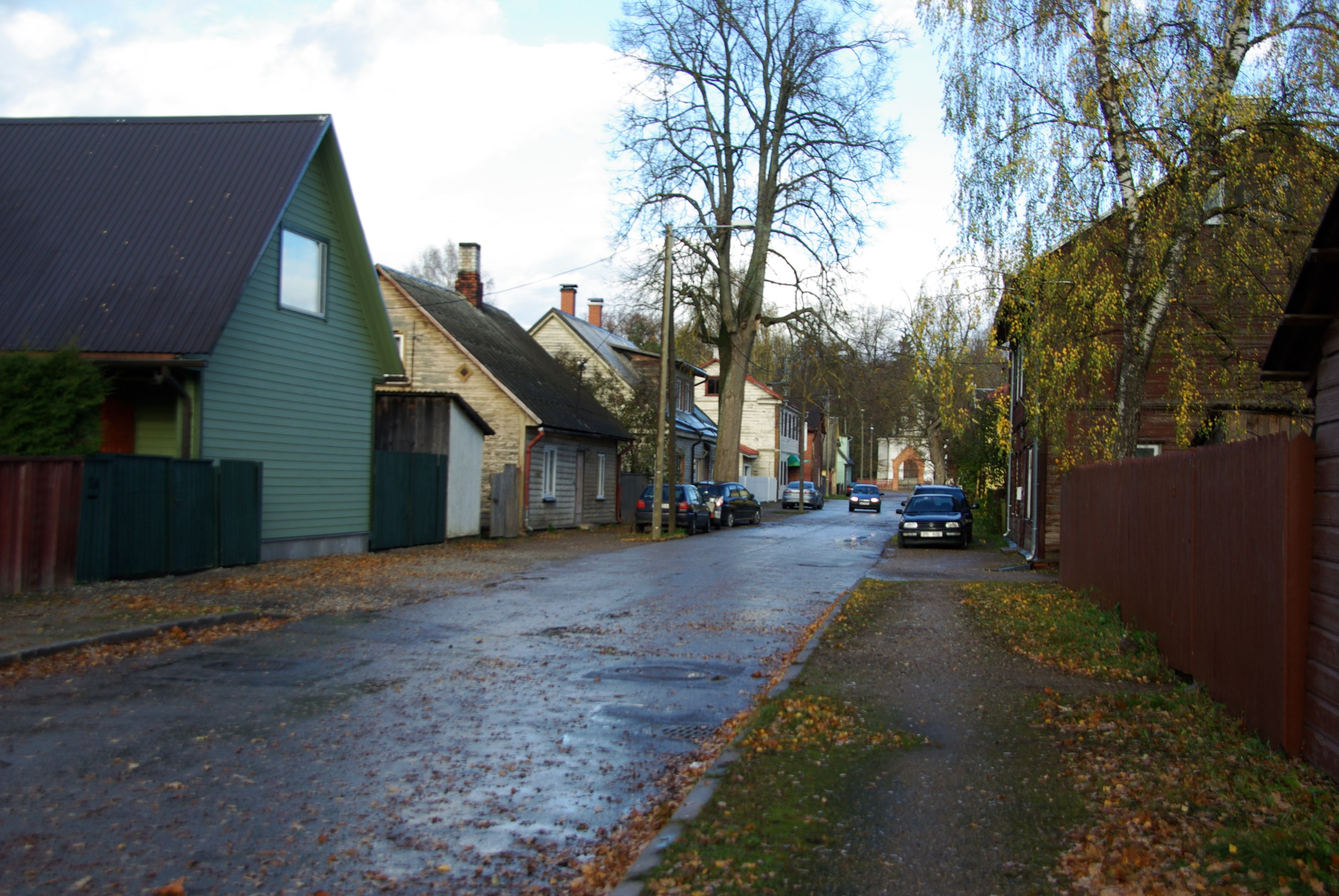 Tartu